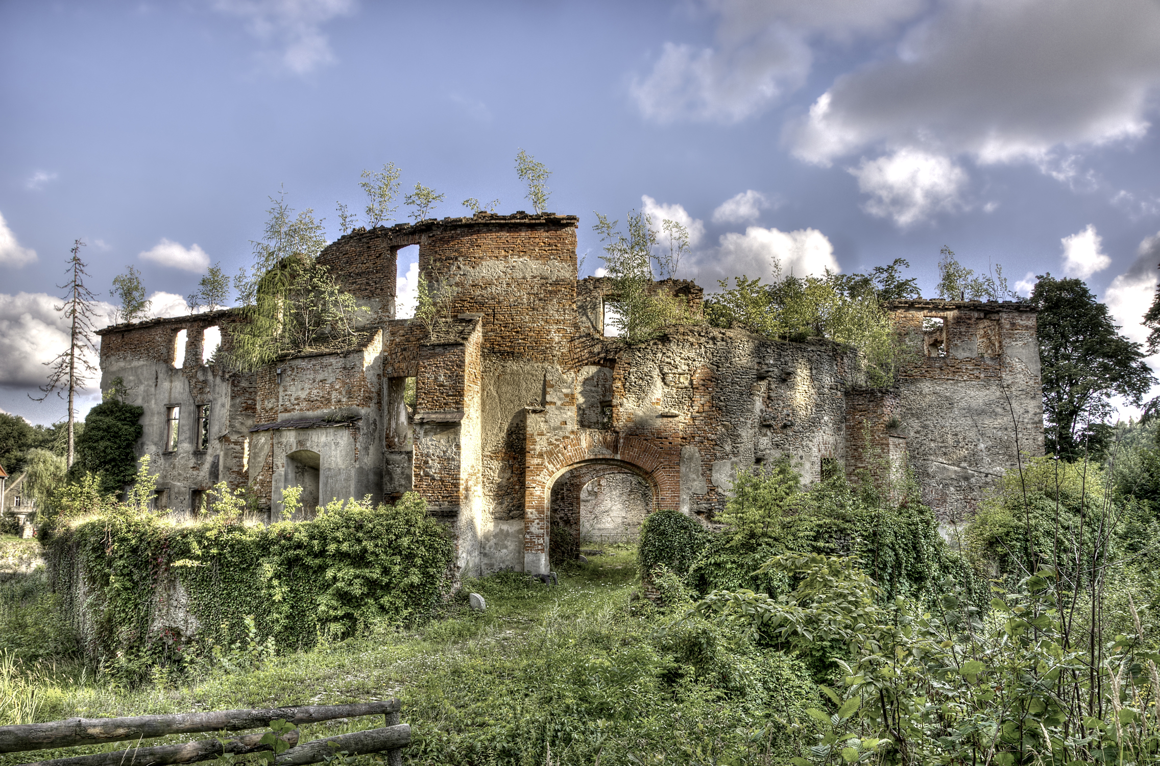 Owiesno - ruiny zamku (zabytek nr A/4474/461)